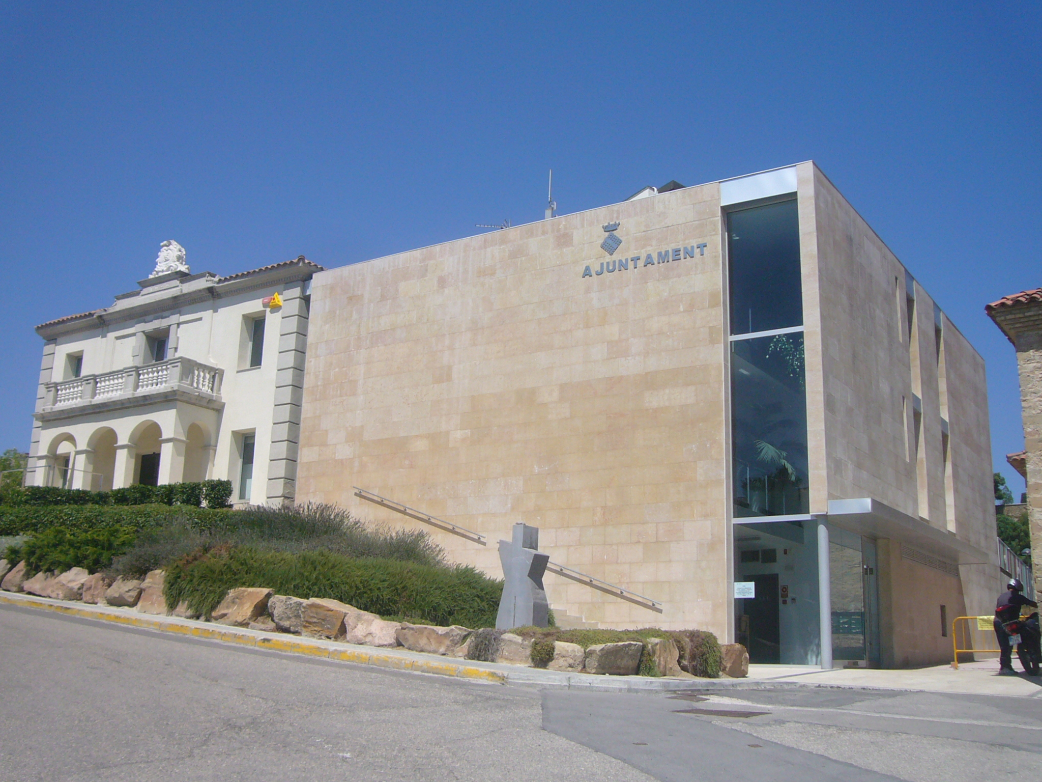 Ajuntament d'Òdena (Anoia). Edifici nou a la dreta.